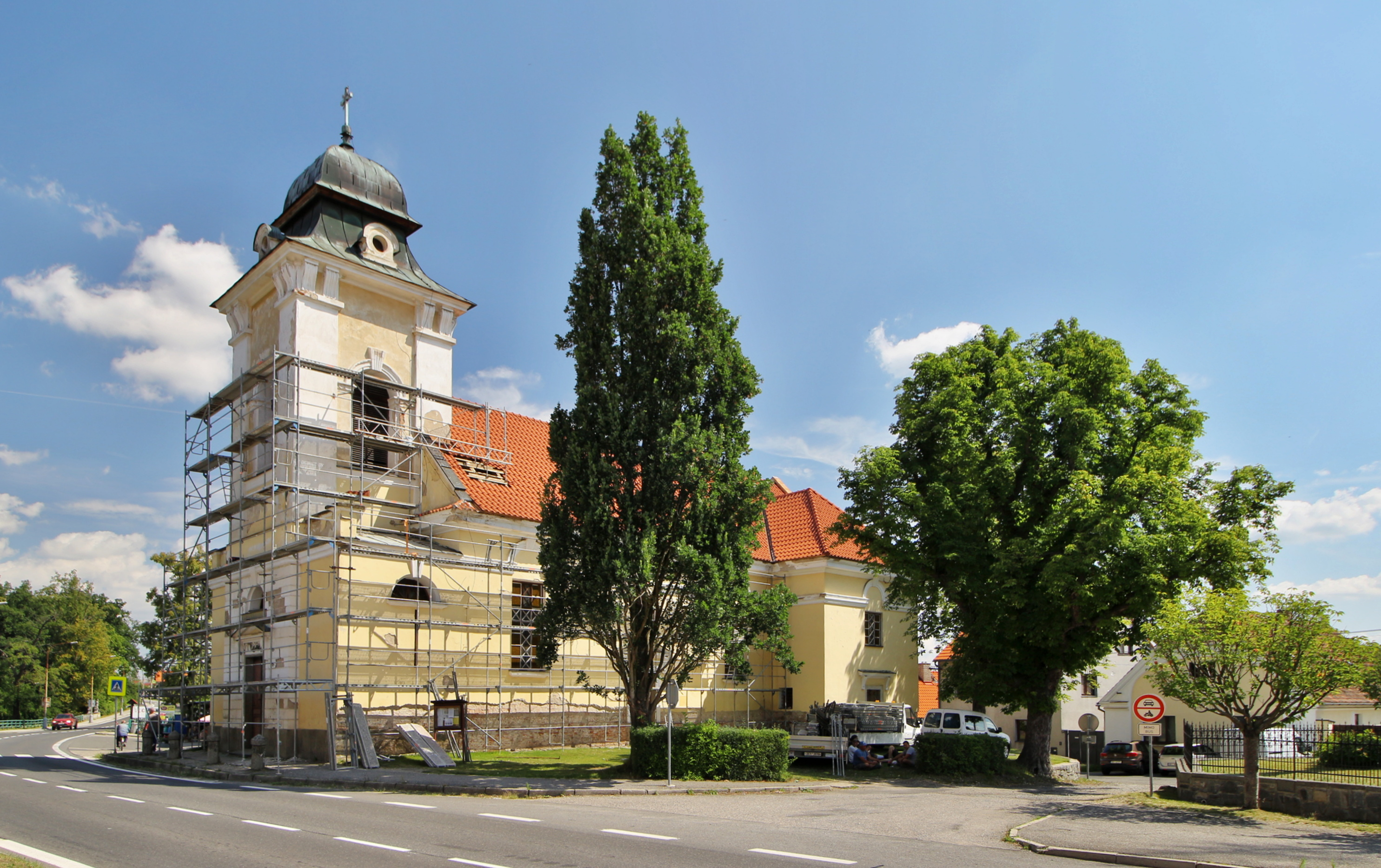 Kostel Nejsvětější Trojice v Čimelicích